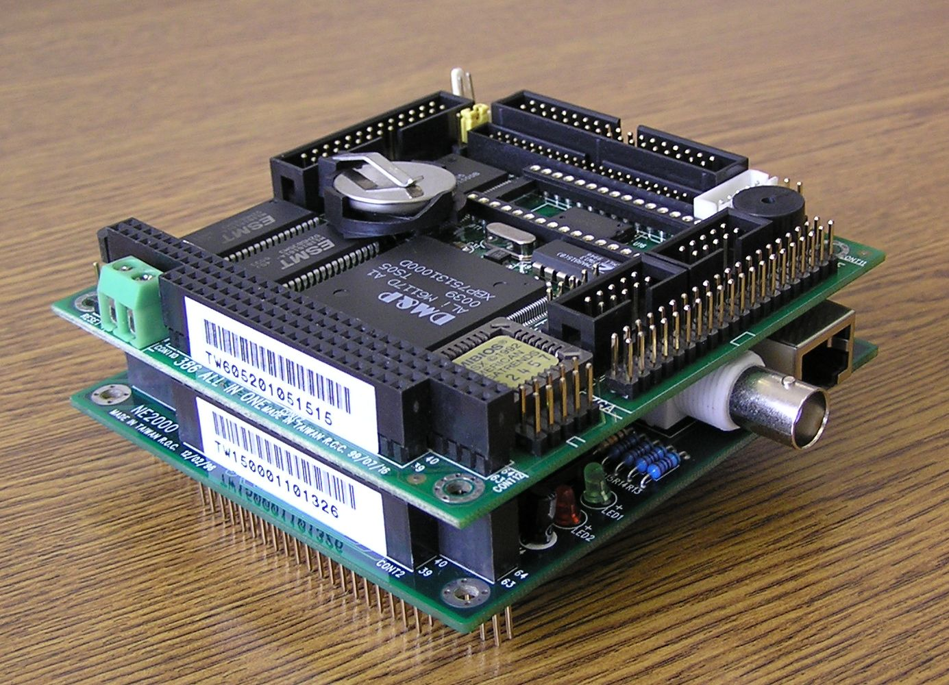 PC/104 "sandwich"